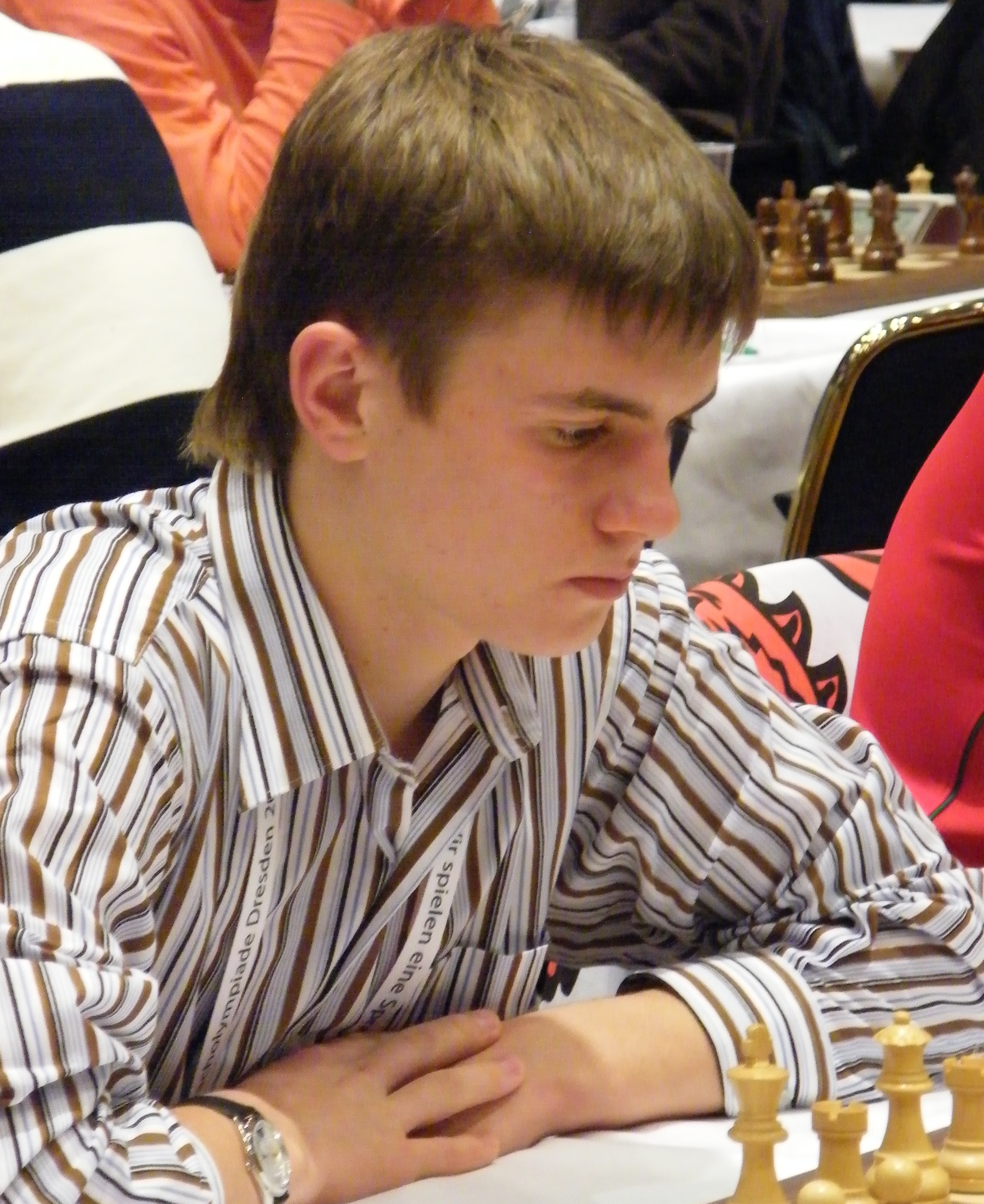 IM Alexander Wolodin (Aleksandr Volodin) bei der Schacholympiade 2008 in Dresden